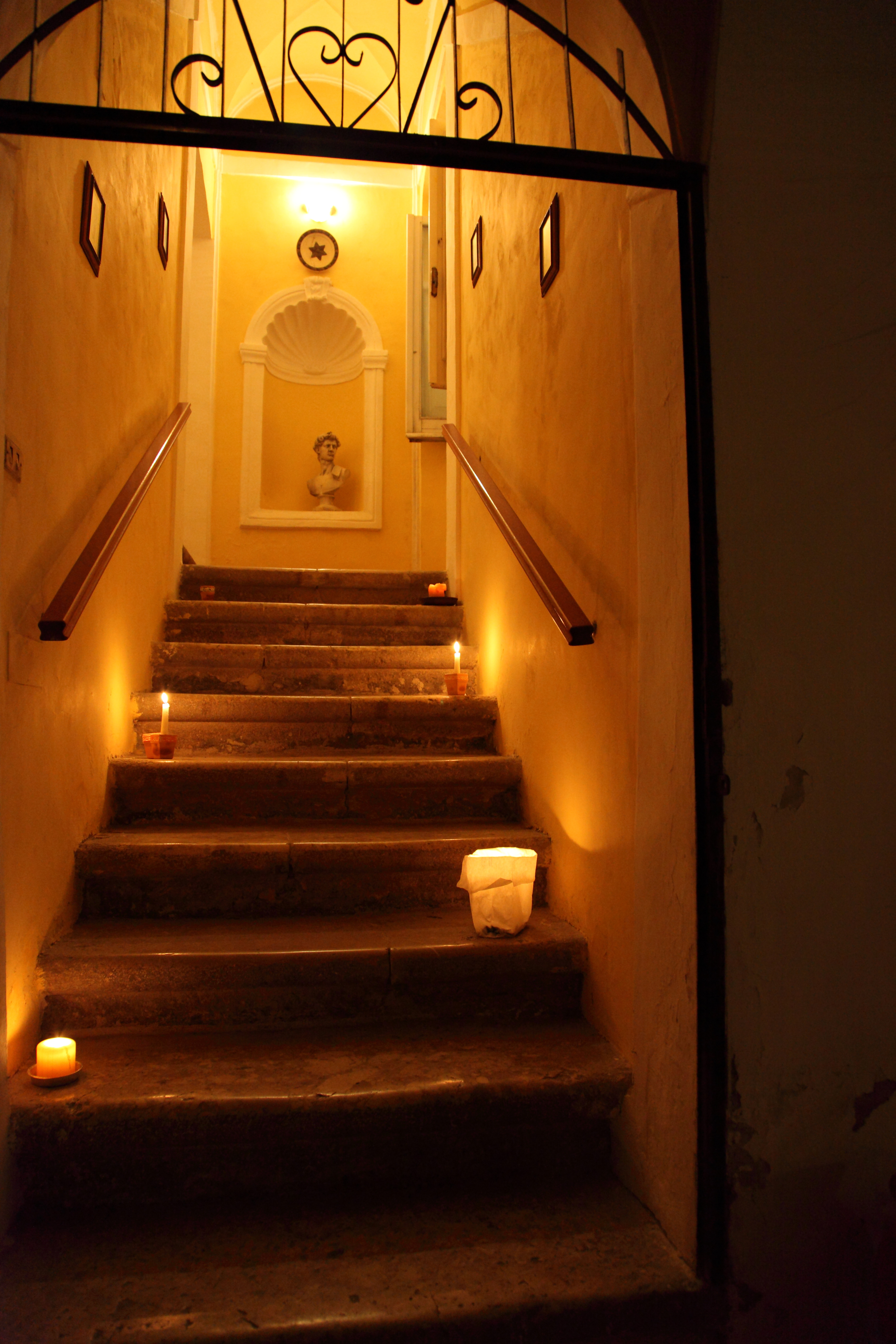 particolare scalinata del palazzo ricciardelli in marmo e nicchie antiche